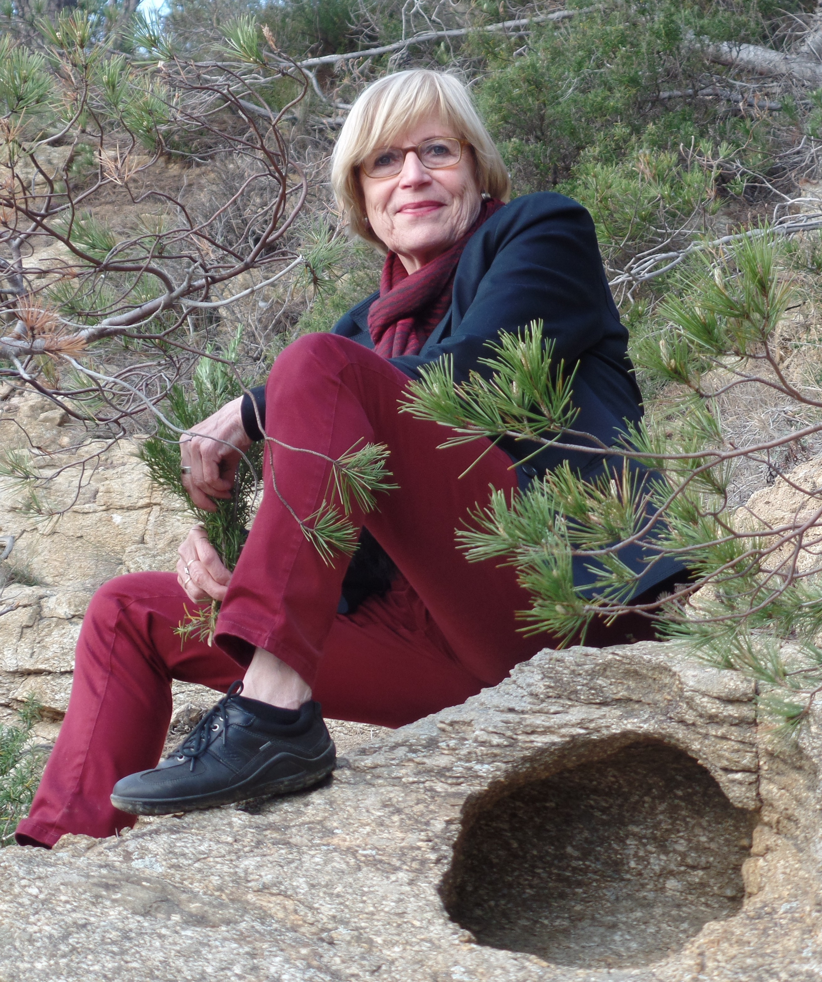 Portrait